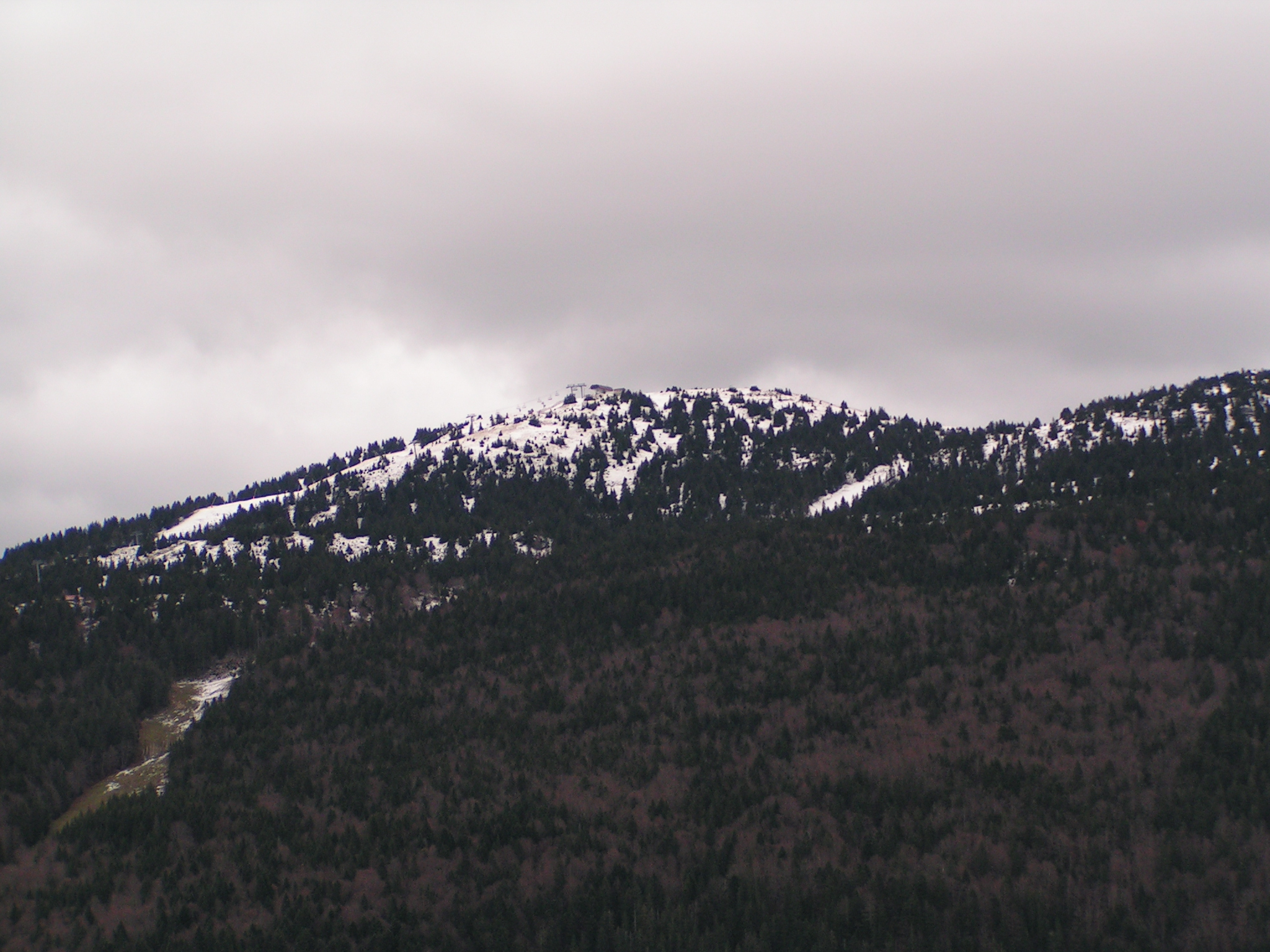 La face ouest du sommet du Montoisey vue depuis le belvédère du Truchet (Ain, France).